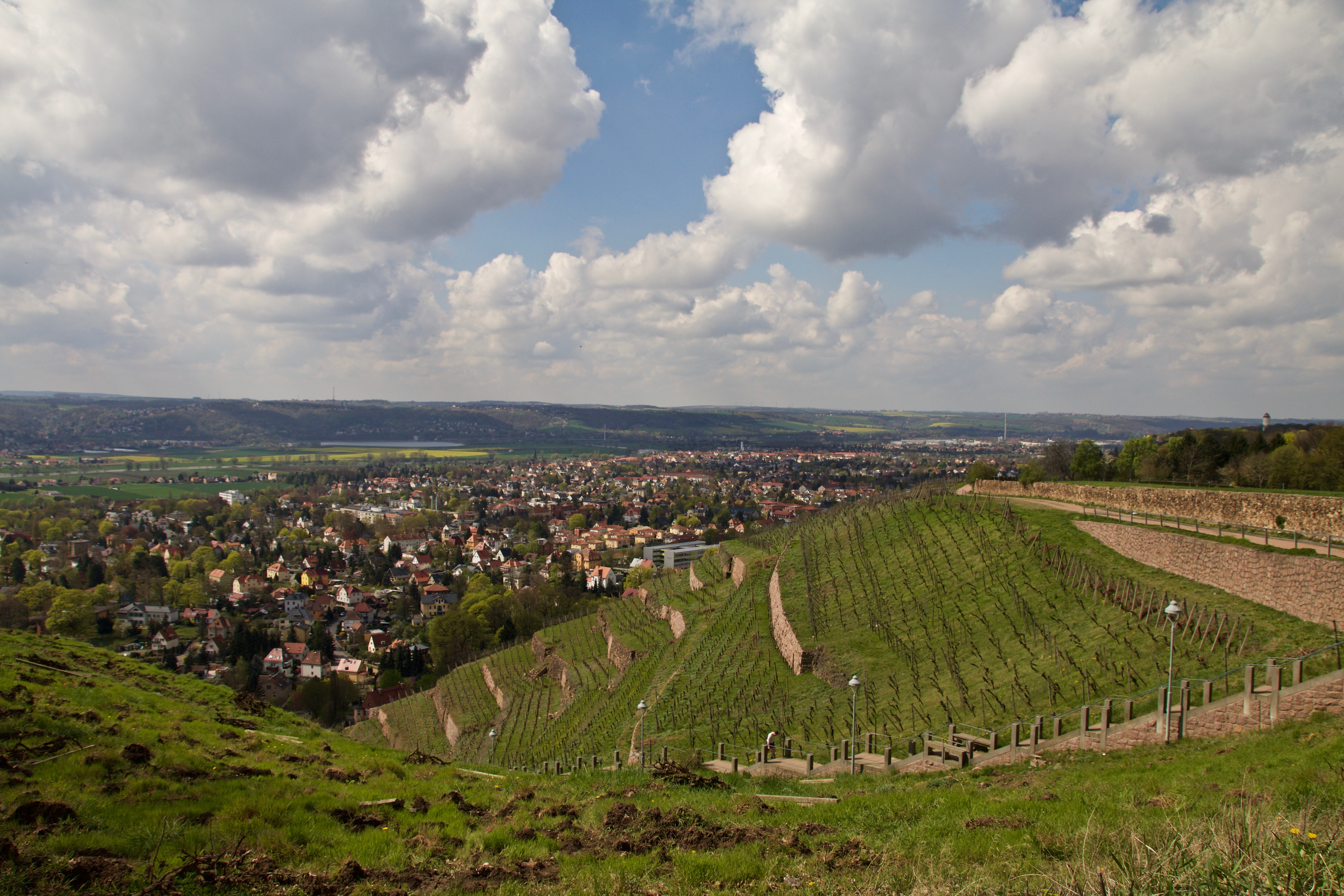 Frühling in Radebeul/ Oberlößnitz